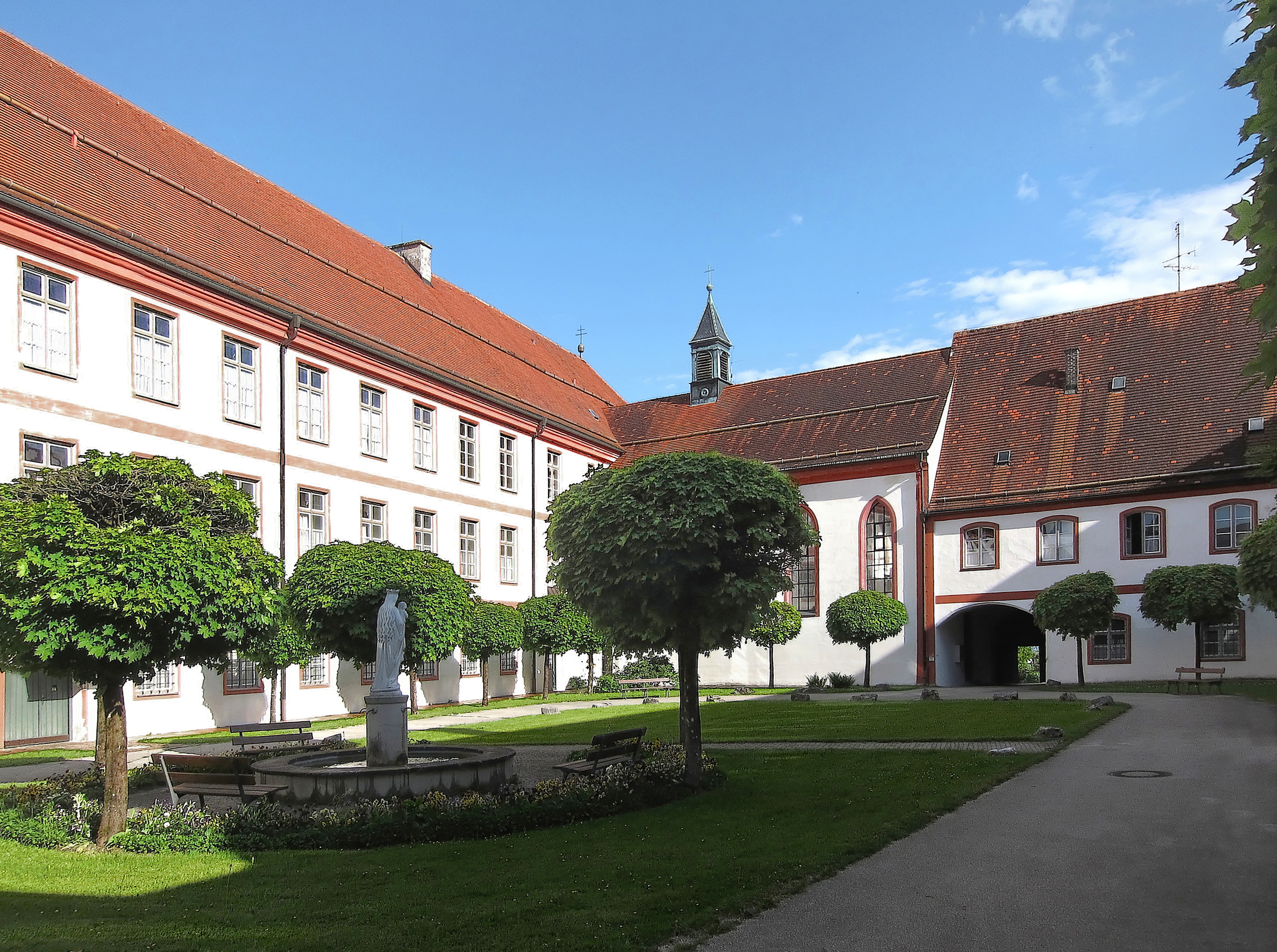 Beuerberg, Klosterhof mit der Kirche "Mariä Heimsuchung"